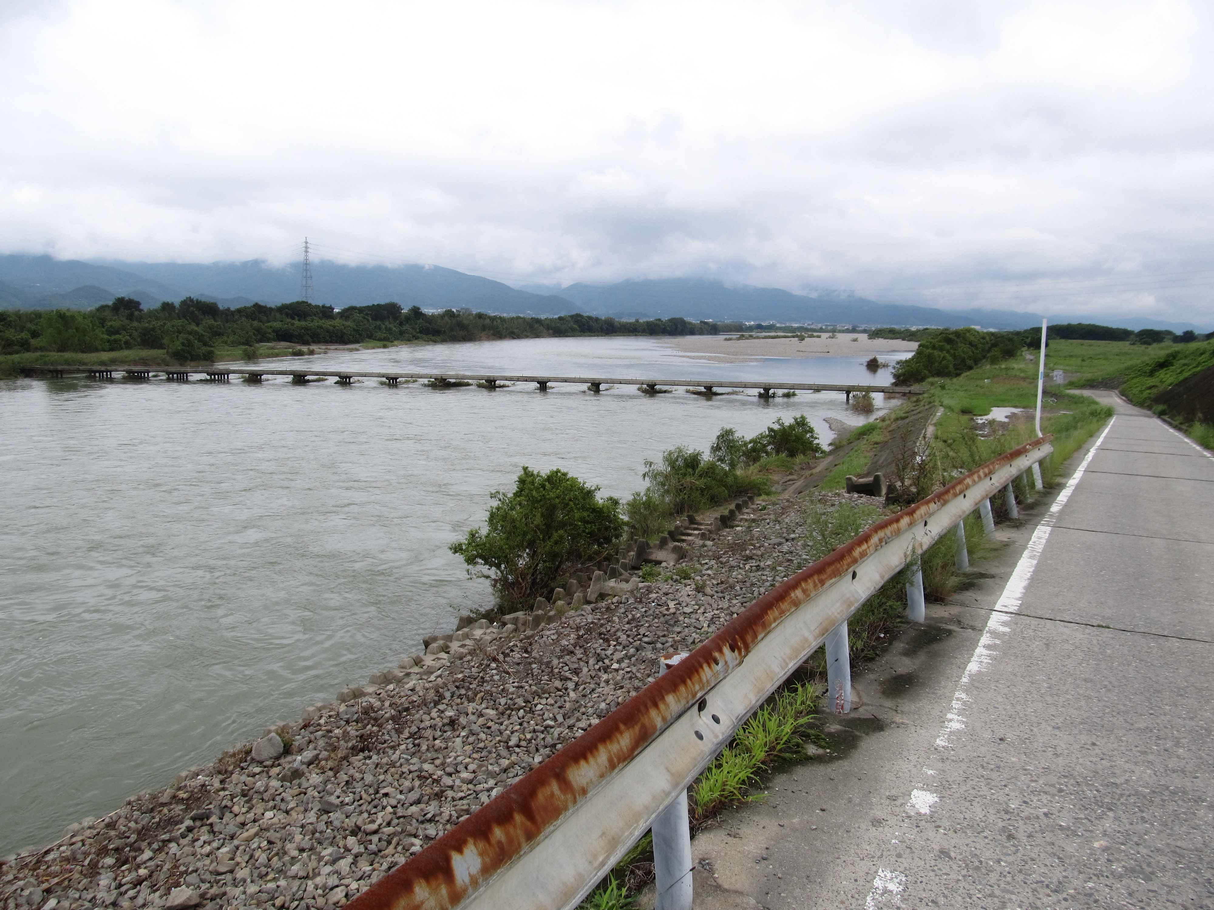 徳島県吉野川市の吉野川に架かる潜水橋・川島橋。 香川県道・徳島県道2号津田・川島線の一部である。